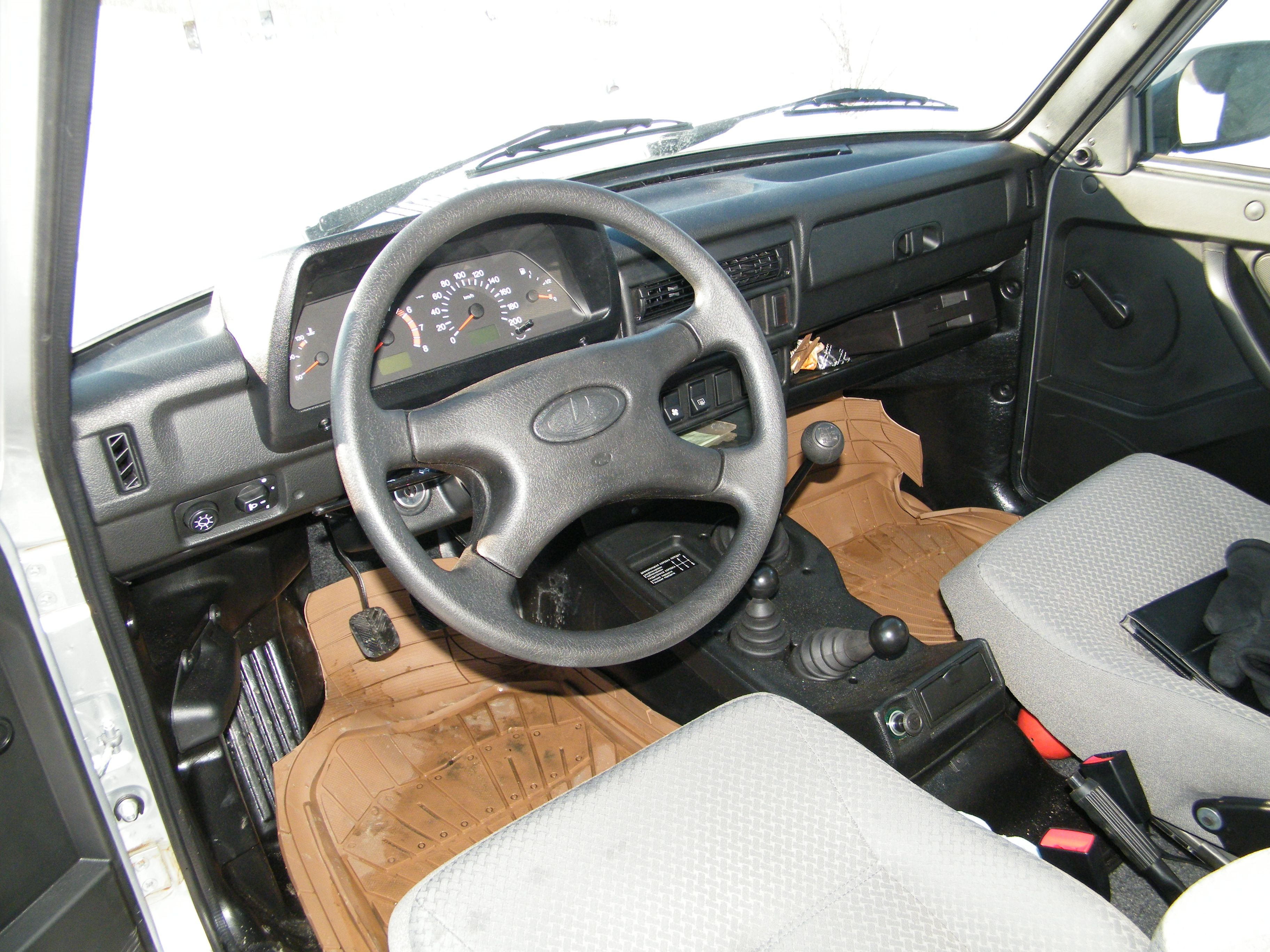 Lada Niva 2131